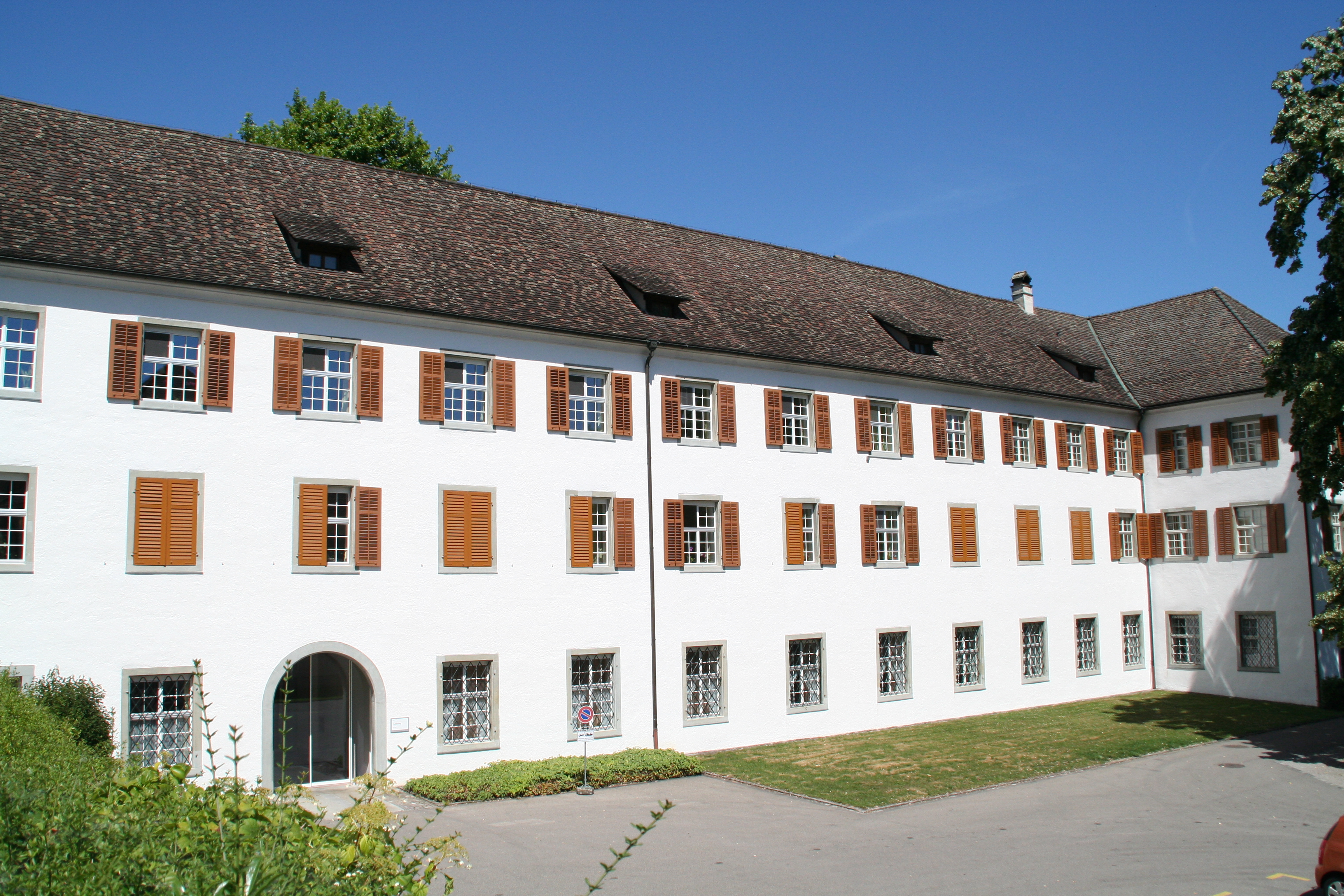 Kloster St. Katharinental in Diessenhofen TG Ostfassade des Hauptgebäudes